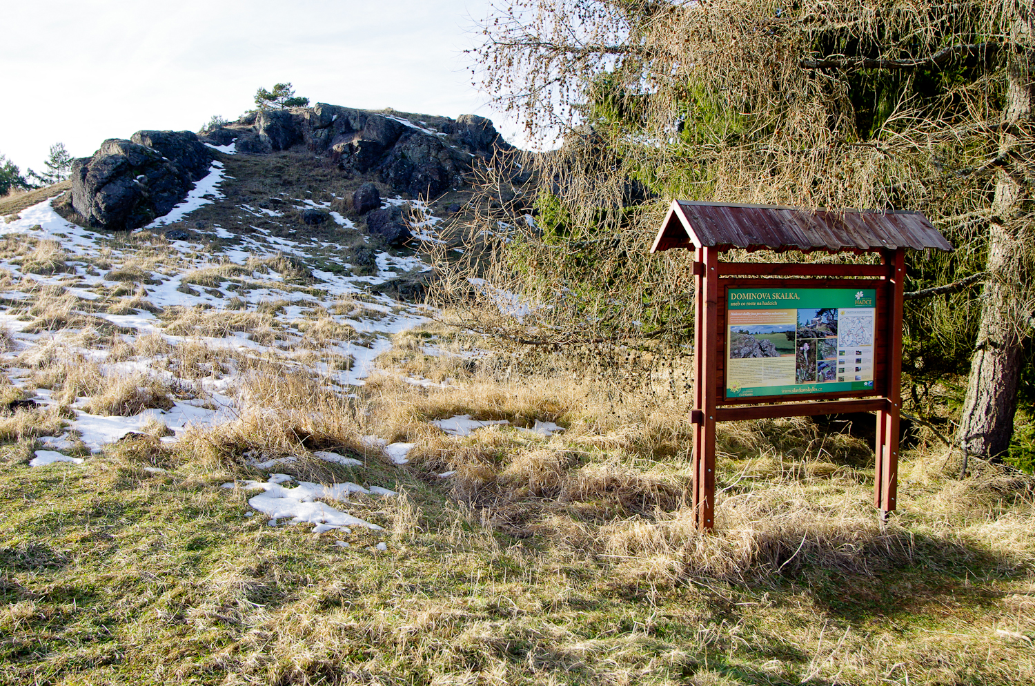 Dominova skalka, přírodní památka, Slavkovský les; více